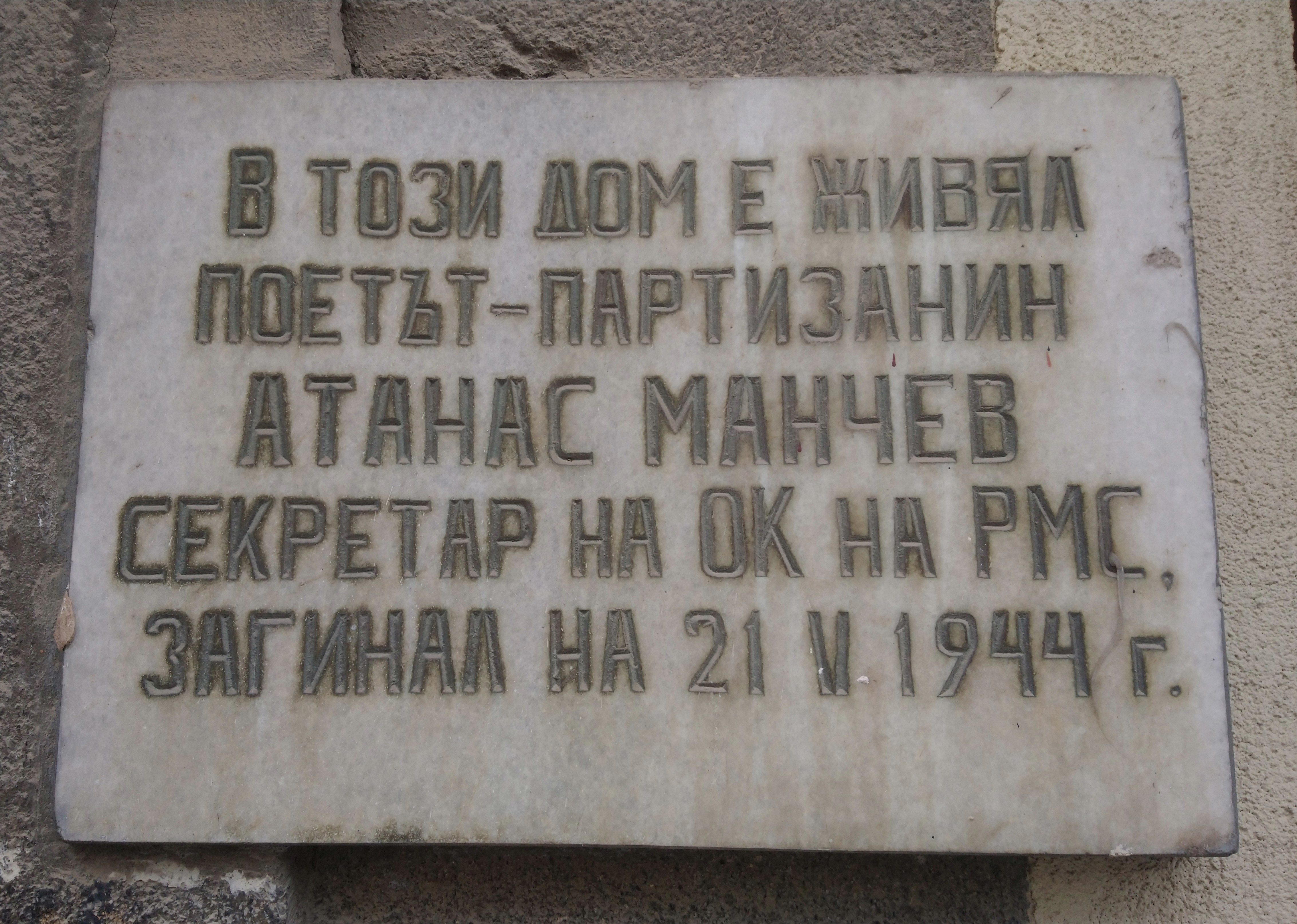 Паметна плоча на поета-партизанин Атанас Манчев, Бургас